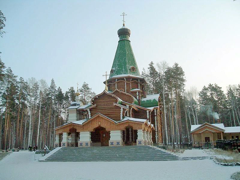 Kirchen im Kloster der "Heiligen Zarenmärtyrer" in Ganina Jama - bei Jekaterinburg / Russland